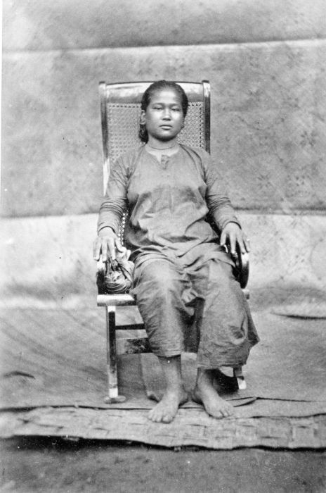 Foto. Deze foto is gemaakt tijdens de Sumatra Expeditie van 1877-1879. Inlandsche typen uit de afdeeling Rawas.. Een twintigjarig meisje uit Moeara Menkoelem, district Rawas, Sumatra